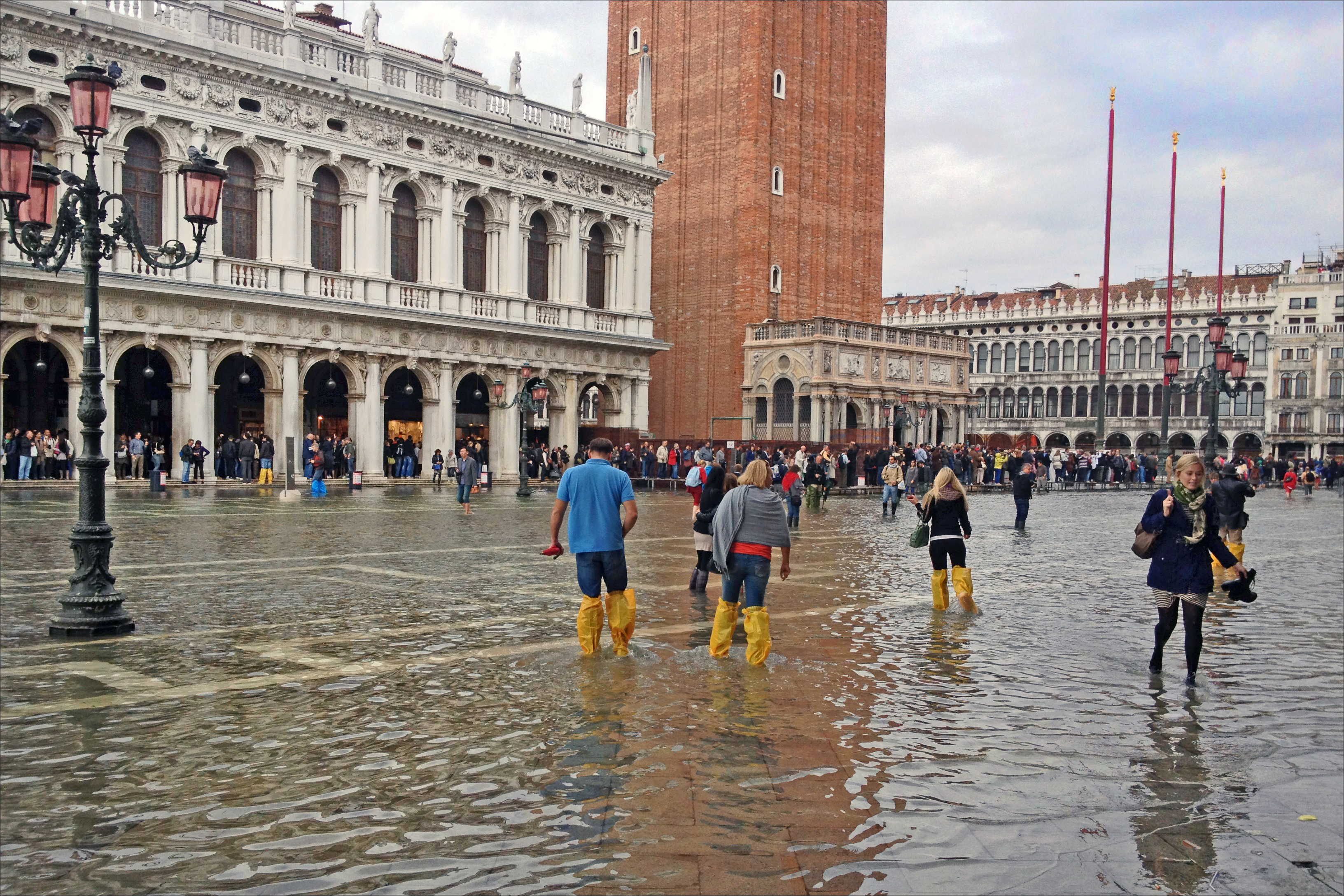 L'Acqua Alta se produit à Venise quand la marée haute se conjugue avec des basses pressions et que le Sirocco, se met à souffler, ce qui "retient" l'eau dans la lagune. La place San Marco est la première inondée car elle est plus basse que d'autres parties de la ville. En réalité, l'Acqua Alta ne dure pas longtemps, lorsqu'elle se produit la circulation des piétons dans les zones inondées s'effectue sur des passerelles. Site explicatif sur e-Venise